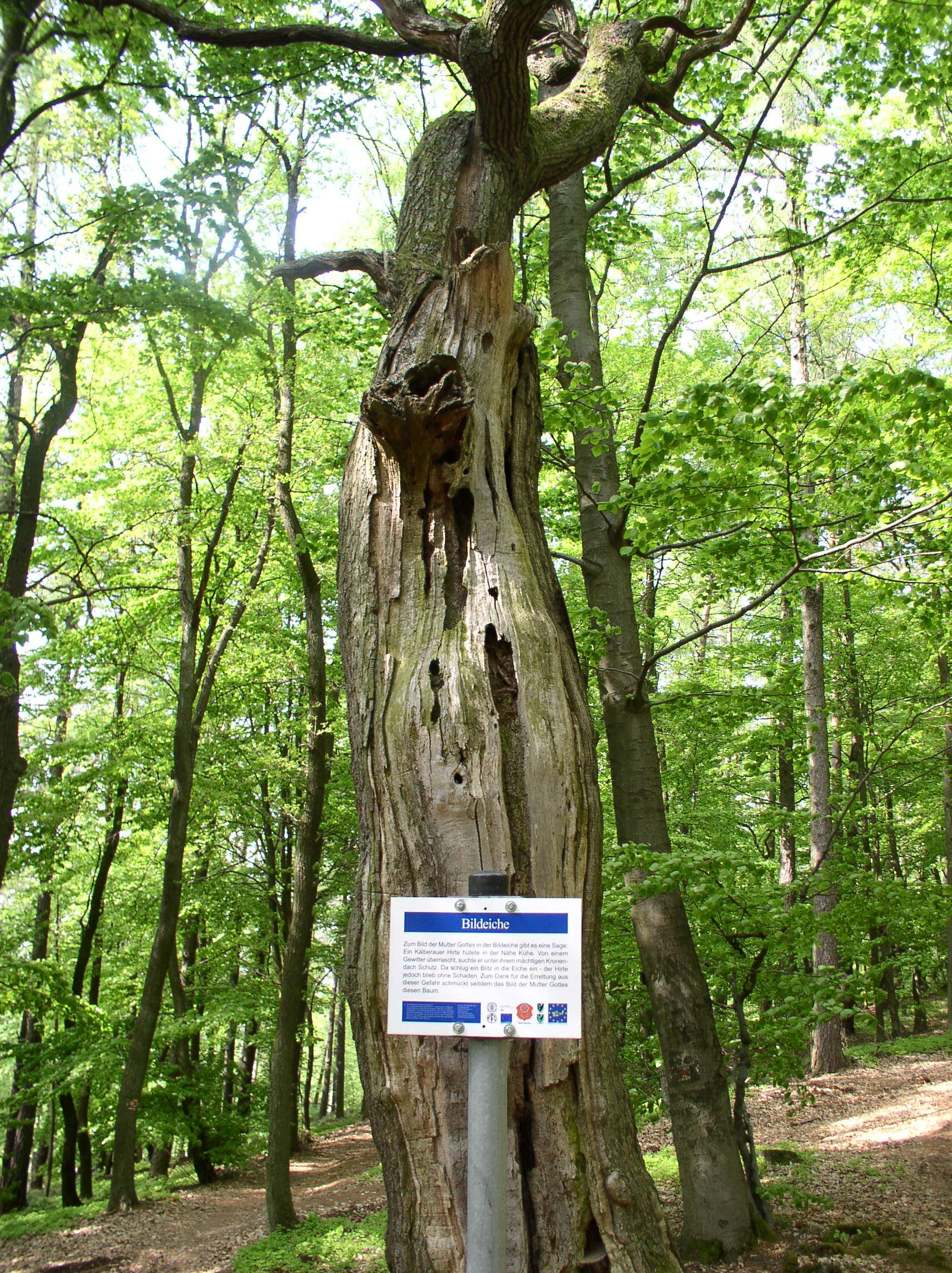 Bildeiche auf dem Hahnenkammrücken